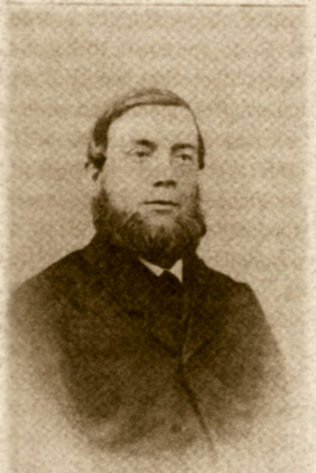 Friedrich Wilhelm Emil Försterling (zeitgenössische Fotografie vor 1872)